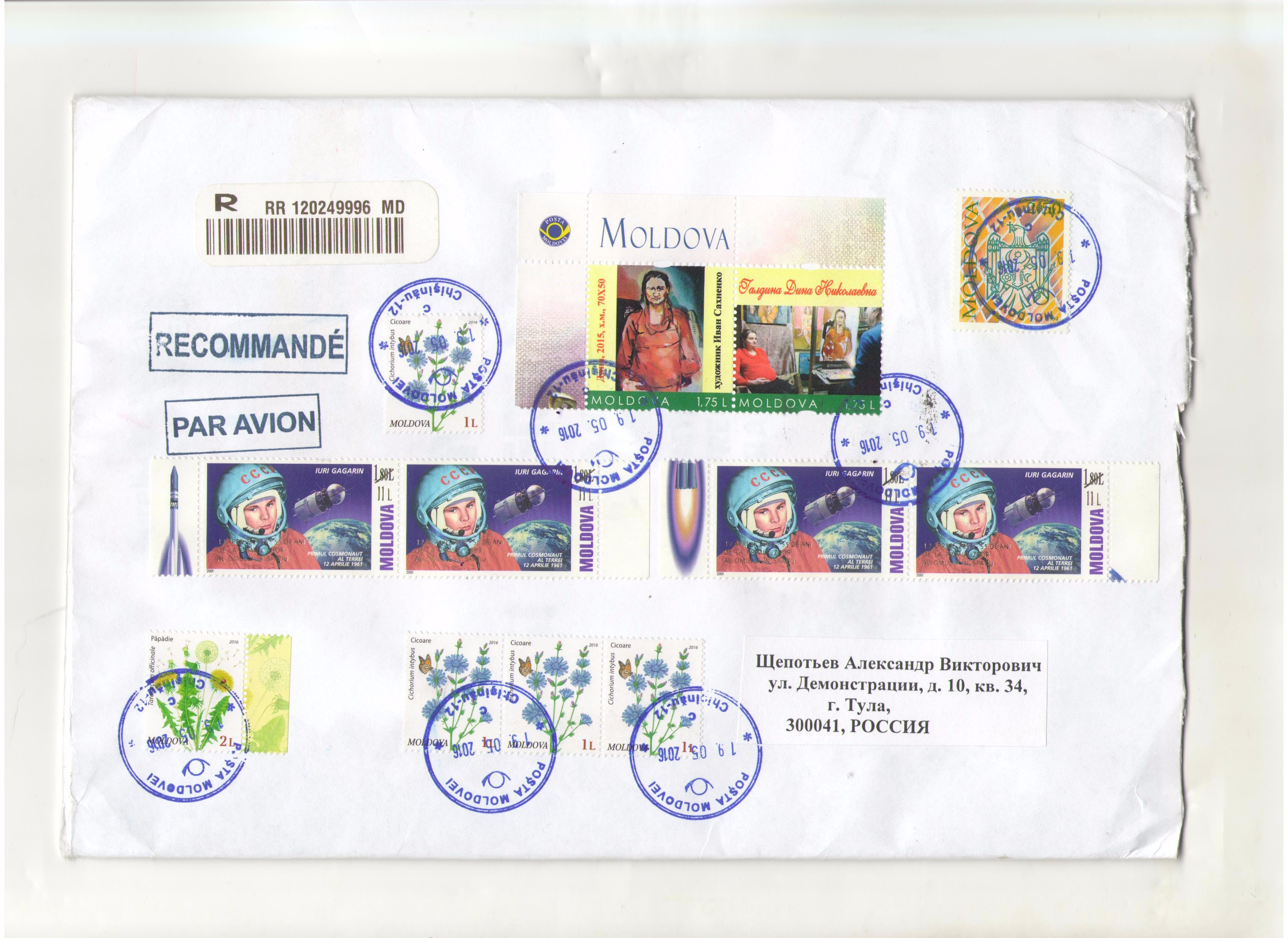 Почтовый конверт, прошедший почту (из Молдовы в Россию), с погашенными персонализированными марками Молдовы, является подтверждение «платежеспособности» персонализированных марок (картина художника Ивана Сахненко: Дина, 2015, х.м., 70Х50; процесс написания художником Иваном Сахненко картины «Дина», 2015, х.м., 70Х50).